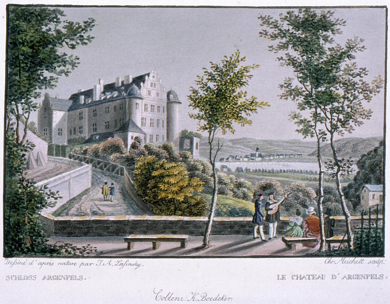 Altkolorierter Aquatintastich von Christian Meichelt nach Vorlage von J.A. Lasinsky um 1830